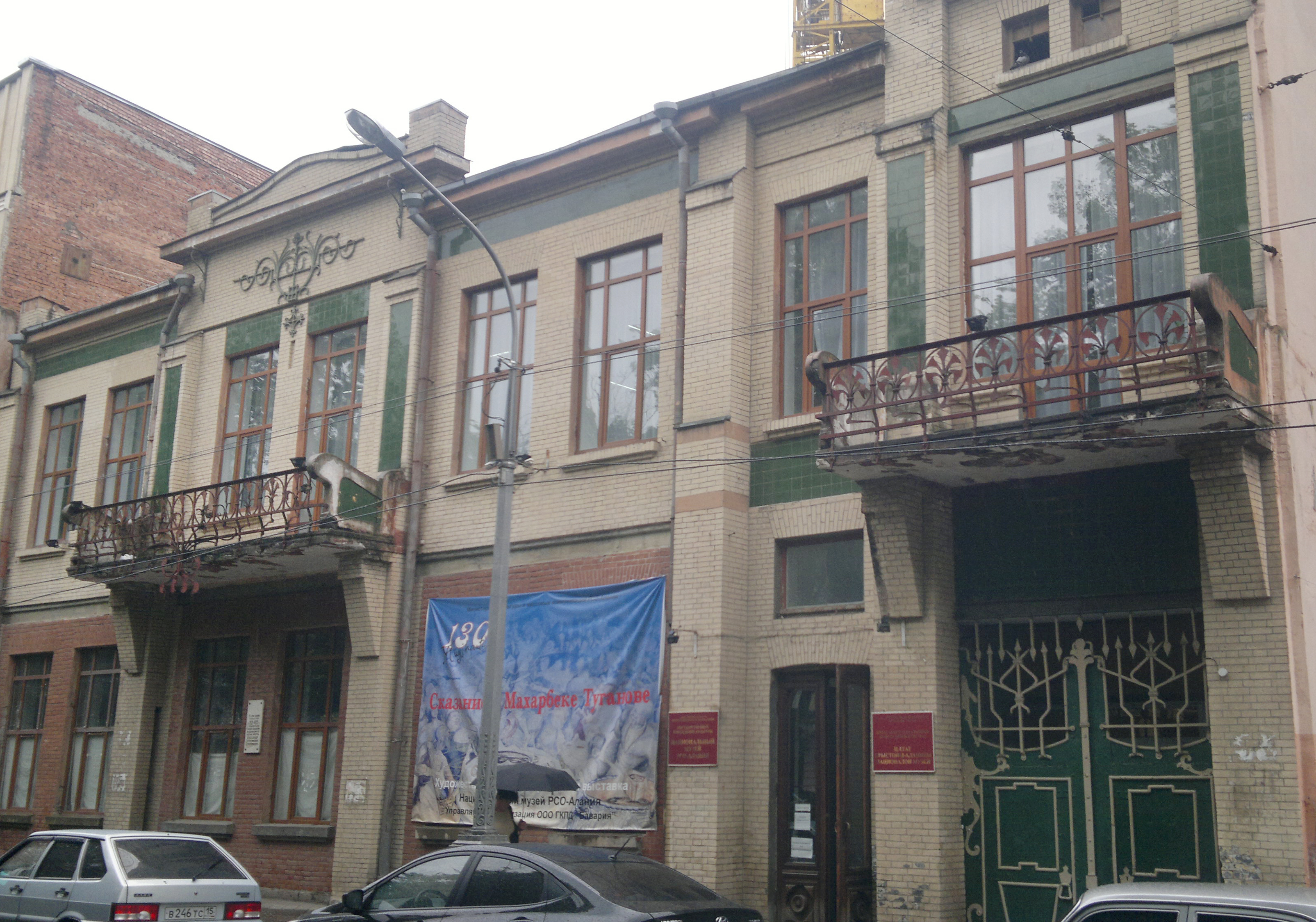 Здание Национального музея РСО-Алания